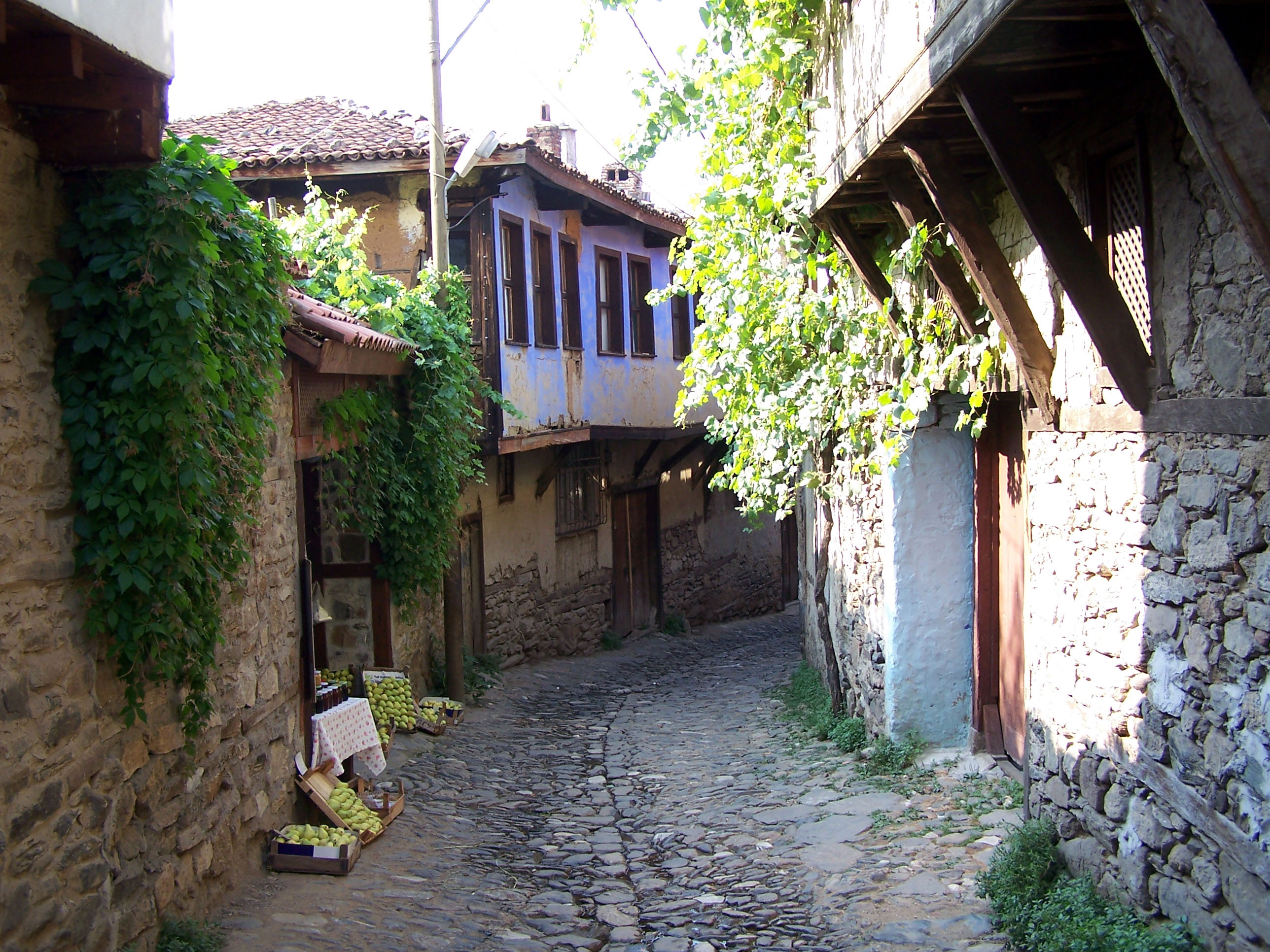 Typical street in Cumalıkızık